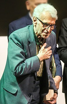 علی اکبرپور در مراسم اختتامیه جشنواره موسیقی آینه دار ۱۳ آذر ۱۳۹۷ تالار وحدت تهران